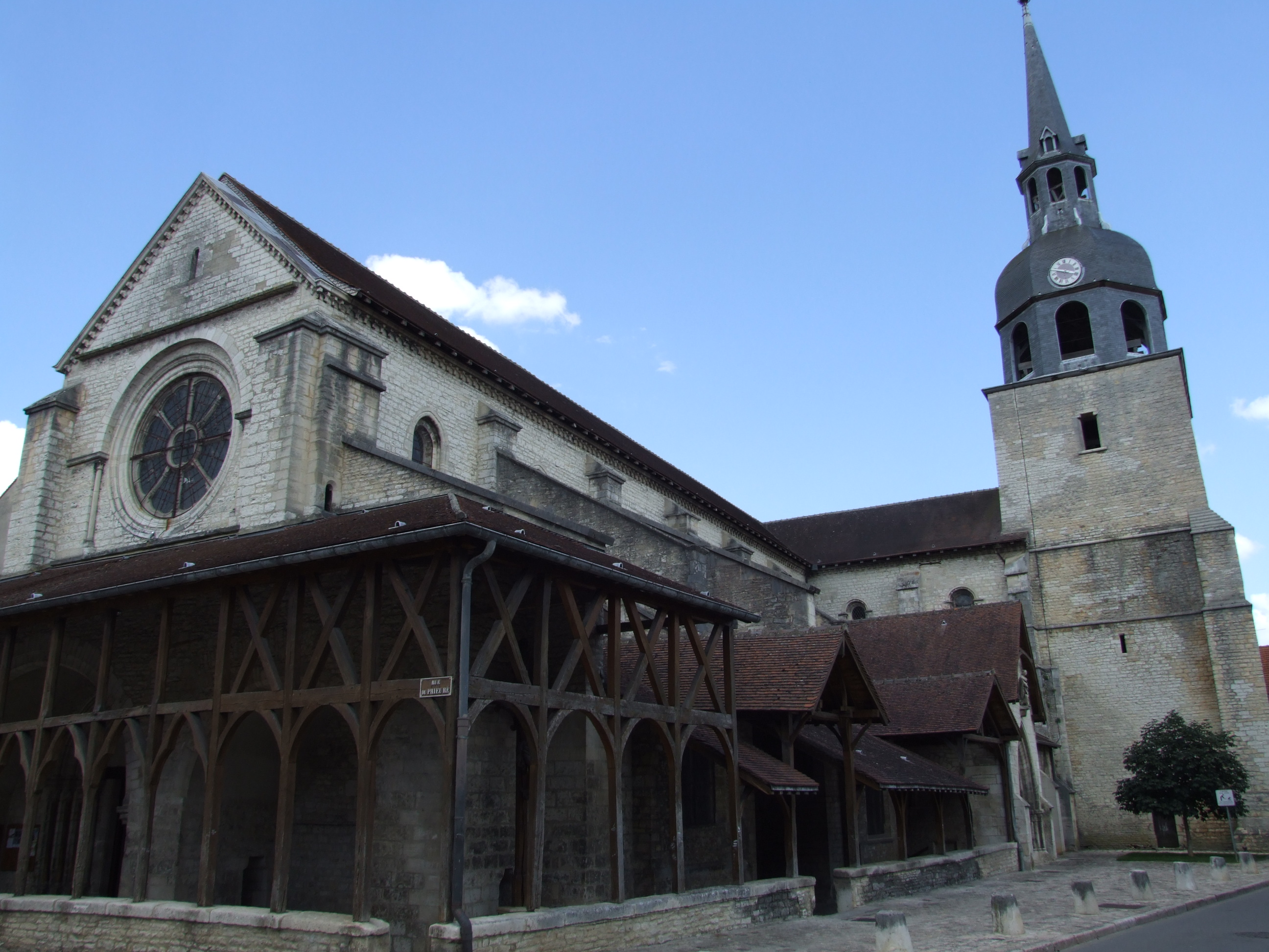 Bar-sur-Aube, Aube, Champagne-Ardennes, FRANCE